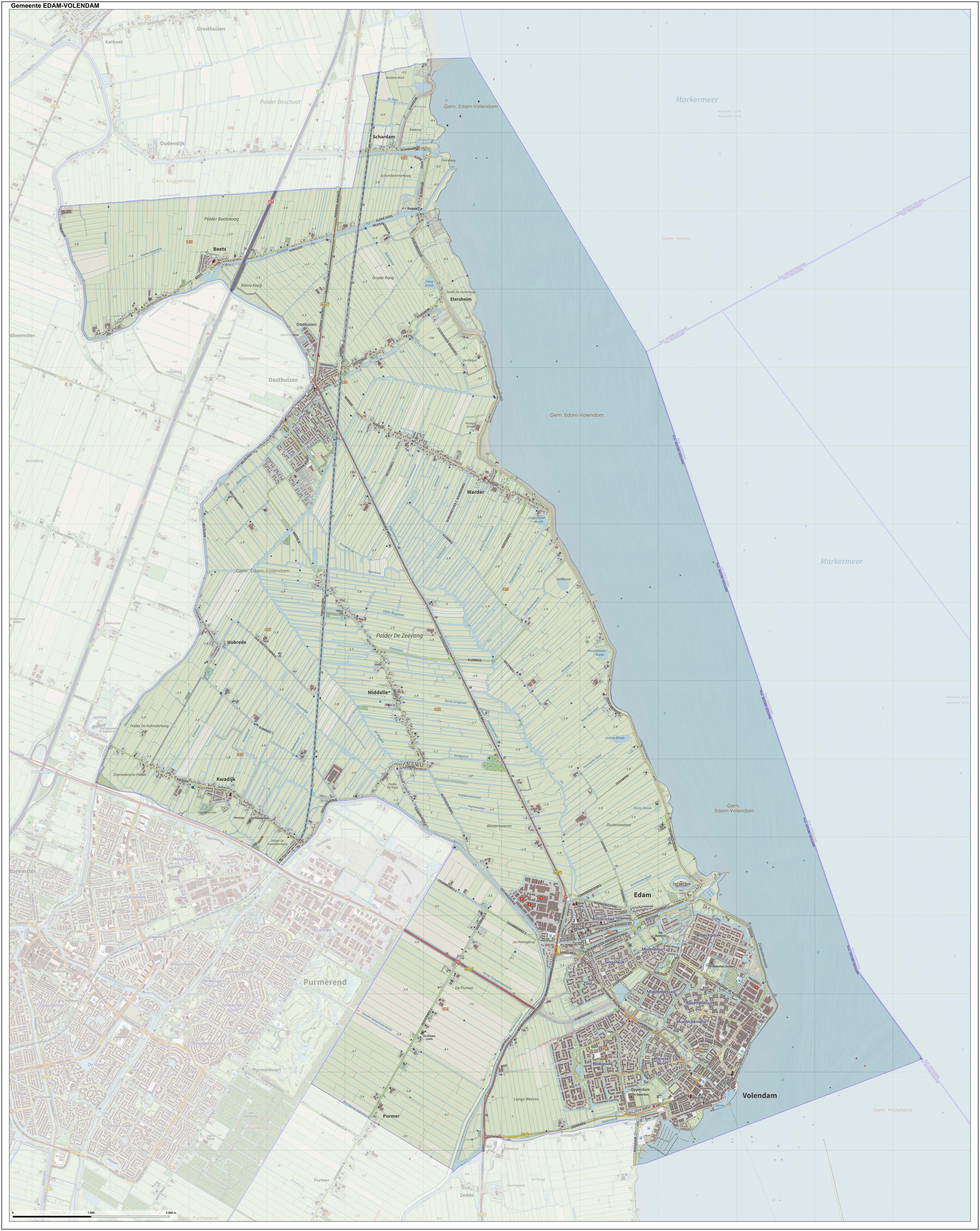 Topografische gemeentekaart. Resolutie: 400 pixels/km. Kaartbeeld samengesteld uit de open geodata van de Top10NL en Top25namen (Kadaster), Creative Commons-BY licentie. Gebouwvlakken uit open geodata BAG extract. Wegen uit de OpenStreetMap, OpenStreetMap community. Reliëfschaduw uit de Actuele Hoogtekaart AHN2. Samenstelling en kleurenschema: Jan-Willem van Aalst, met QGIS. Zie ook de Legenda.